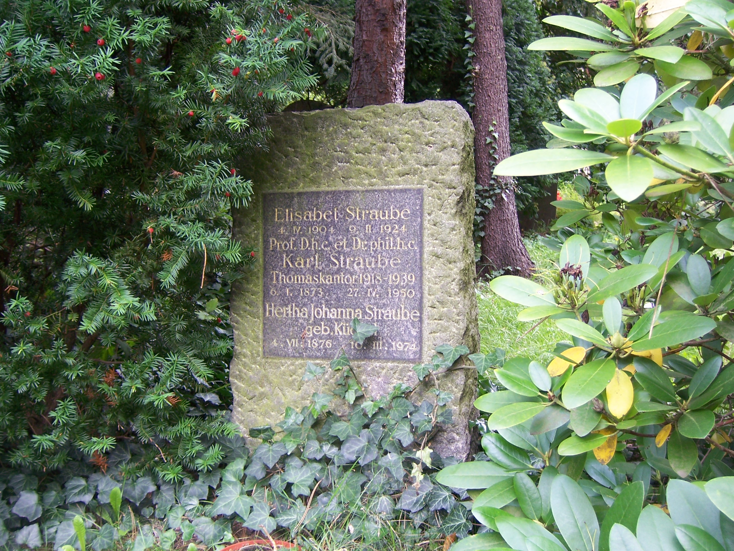 Grabstätte Karl Straube